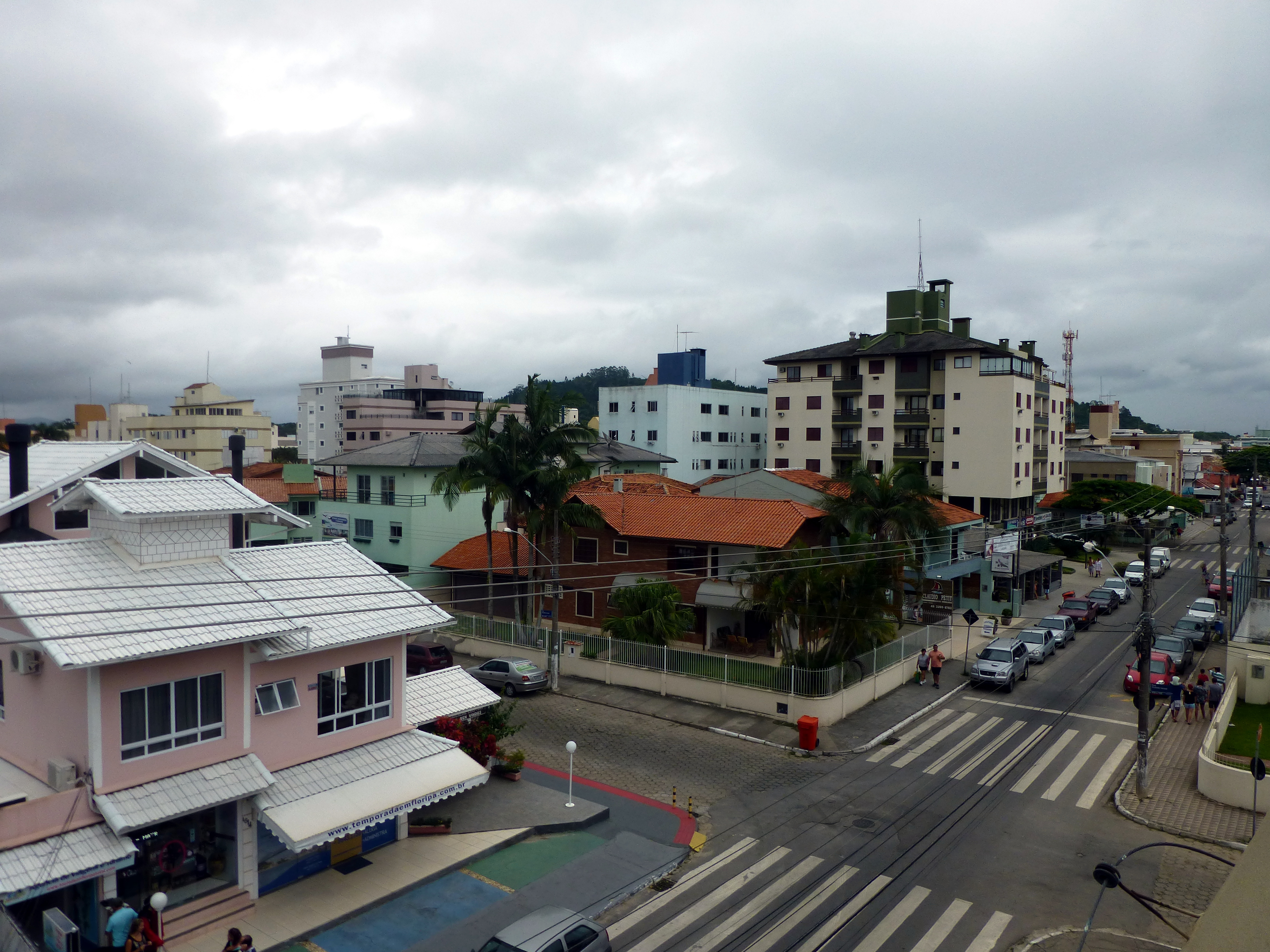 La céntrica calle Rua Maria Villac del barrio de Canasvieiras, al norte de la isla de Santa Catarina, en el municipio de Florianópolis.